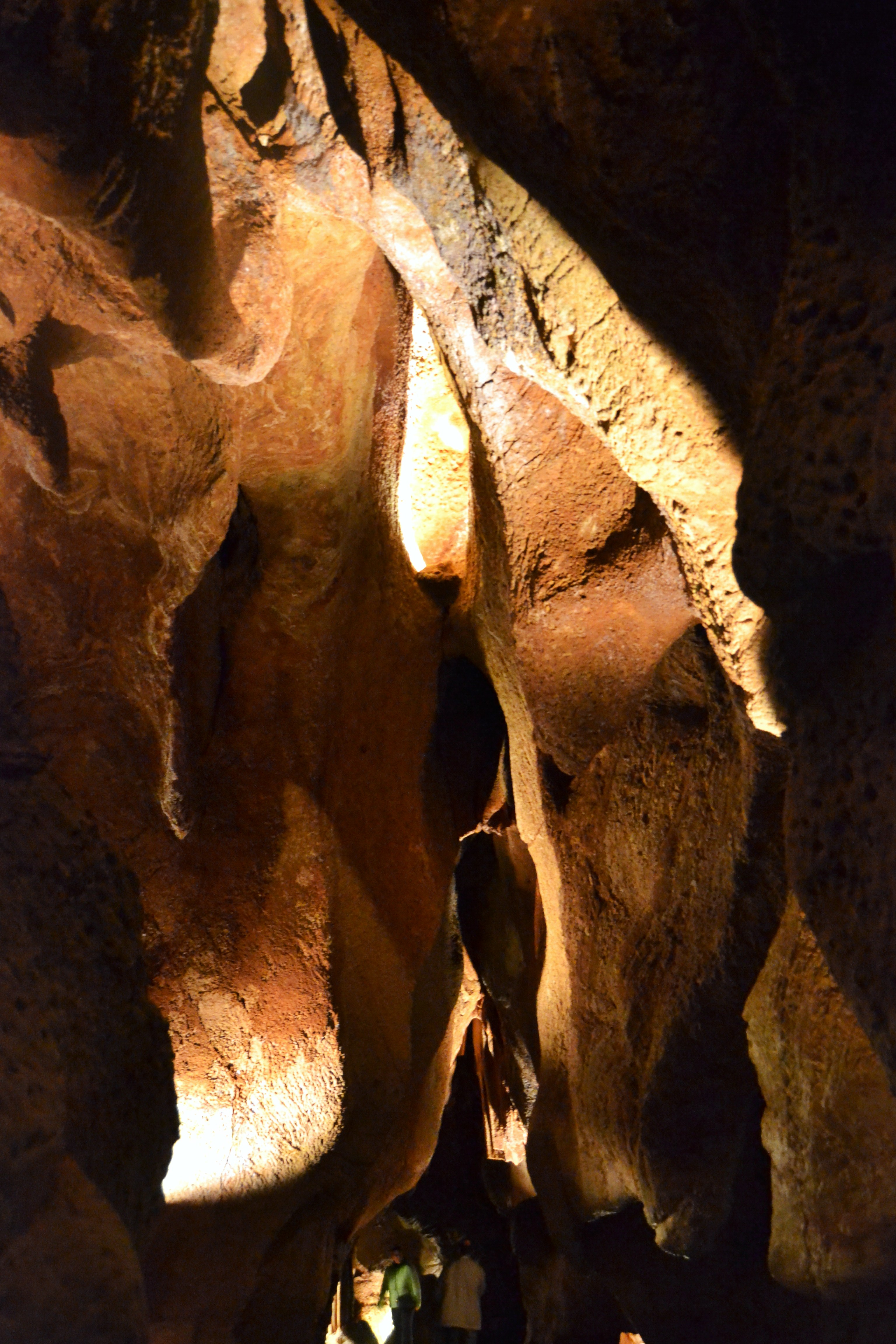 Coves o grutes de sant Josep, la Vall d'Uixó.